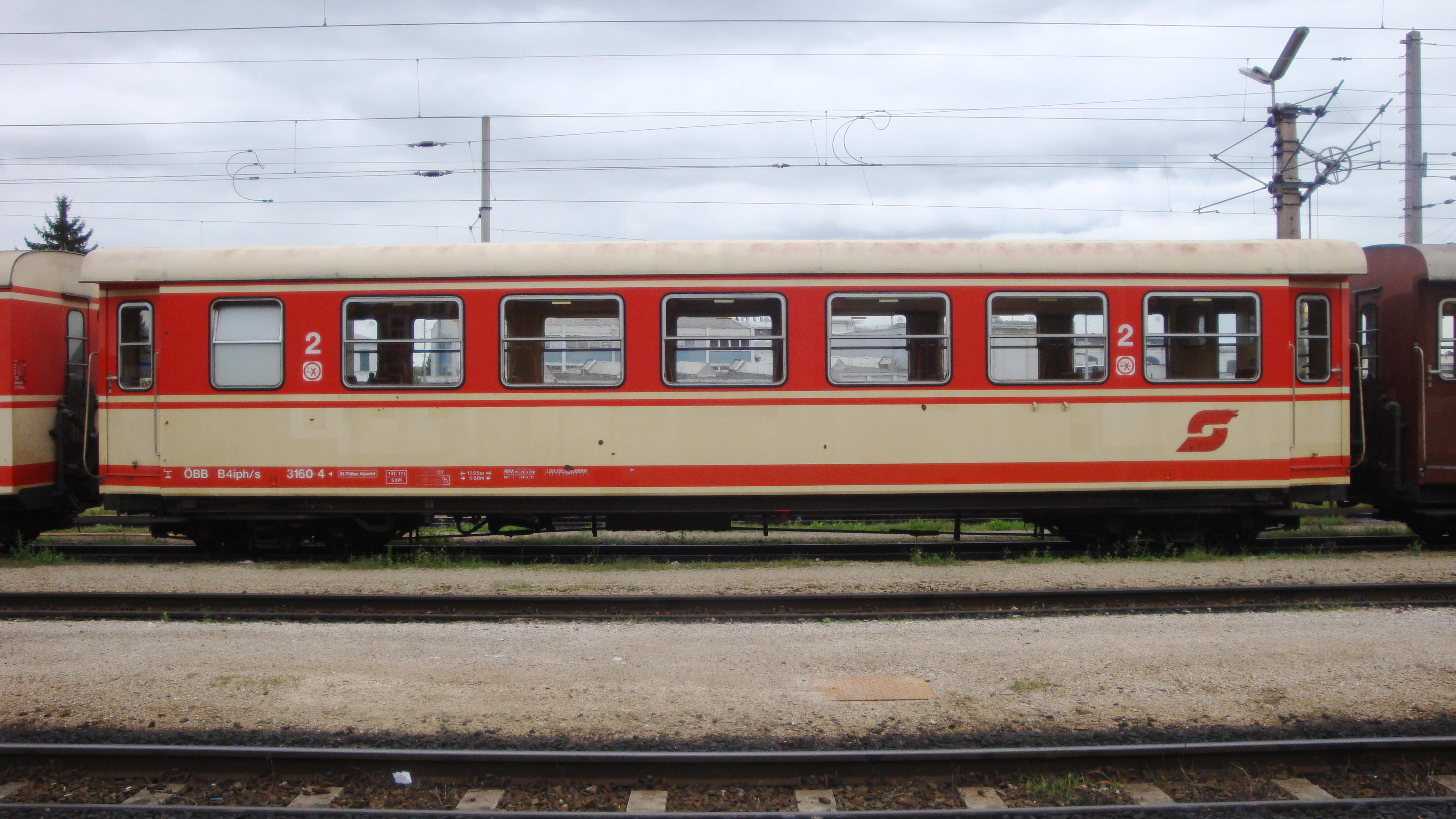 Der B4iph/s 3160-4 trägt die Jaffa-Lackierung (blutorange/elfenbein).